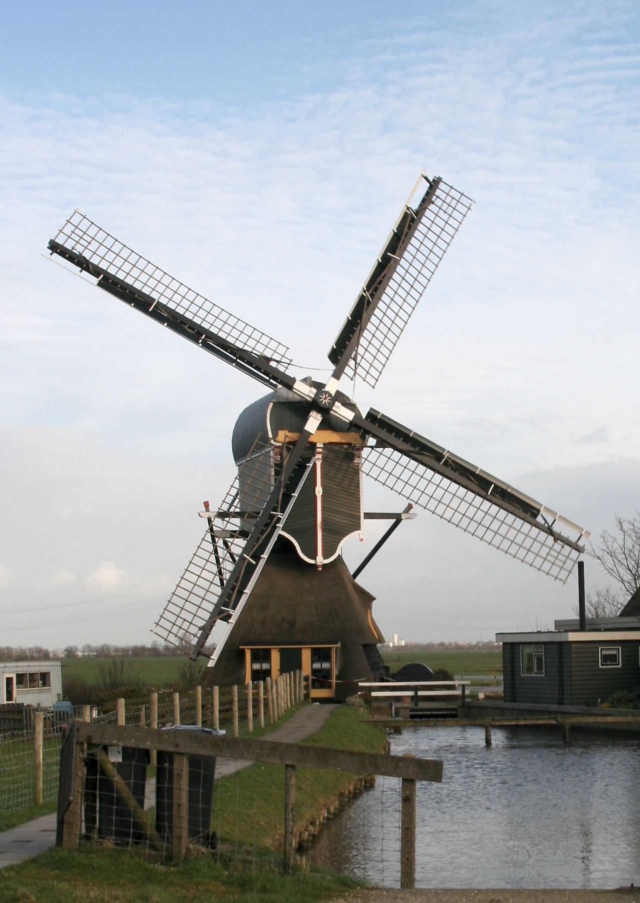 Leiderdorp: Achthovense Molen